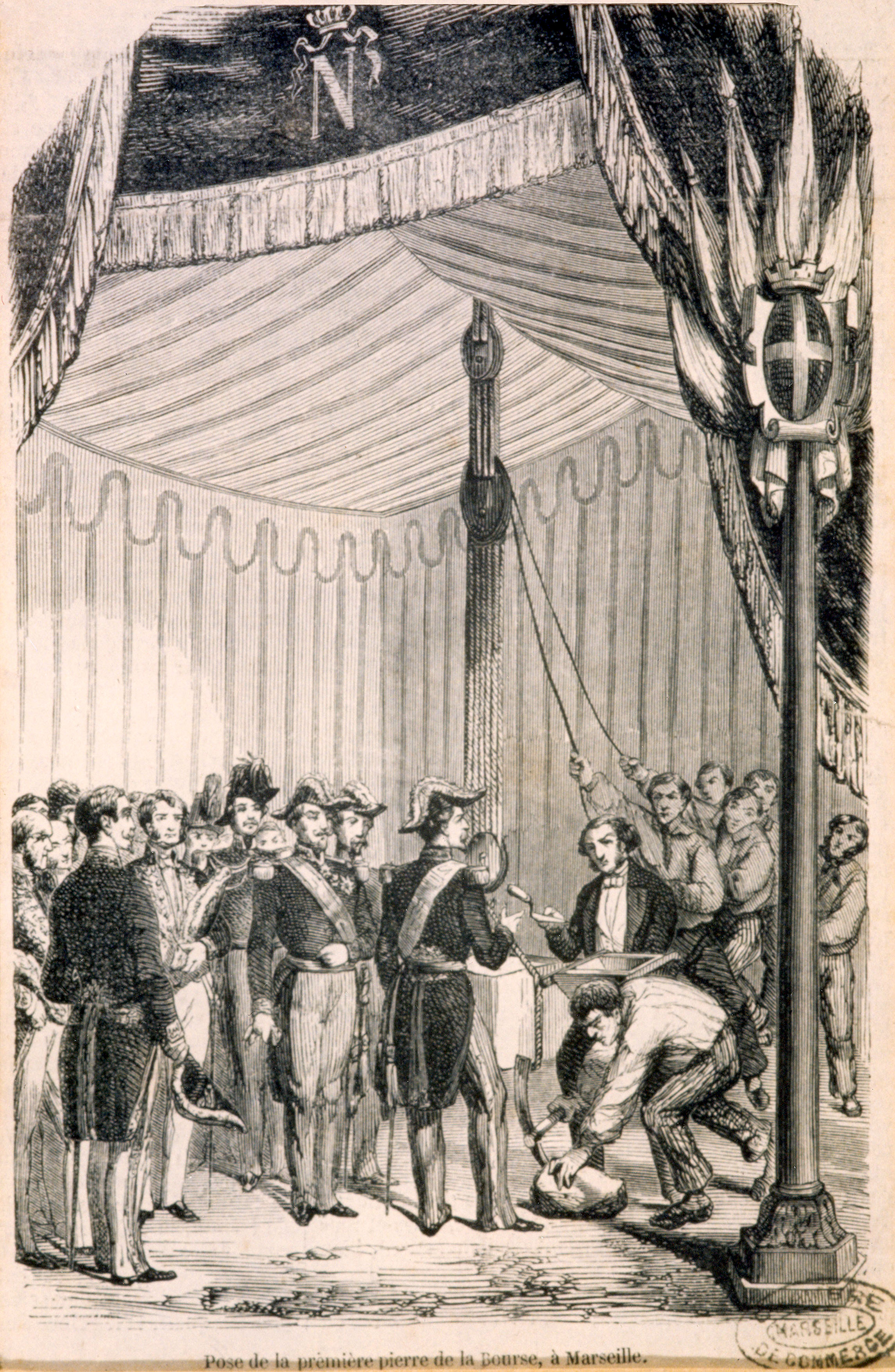 Gravure